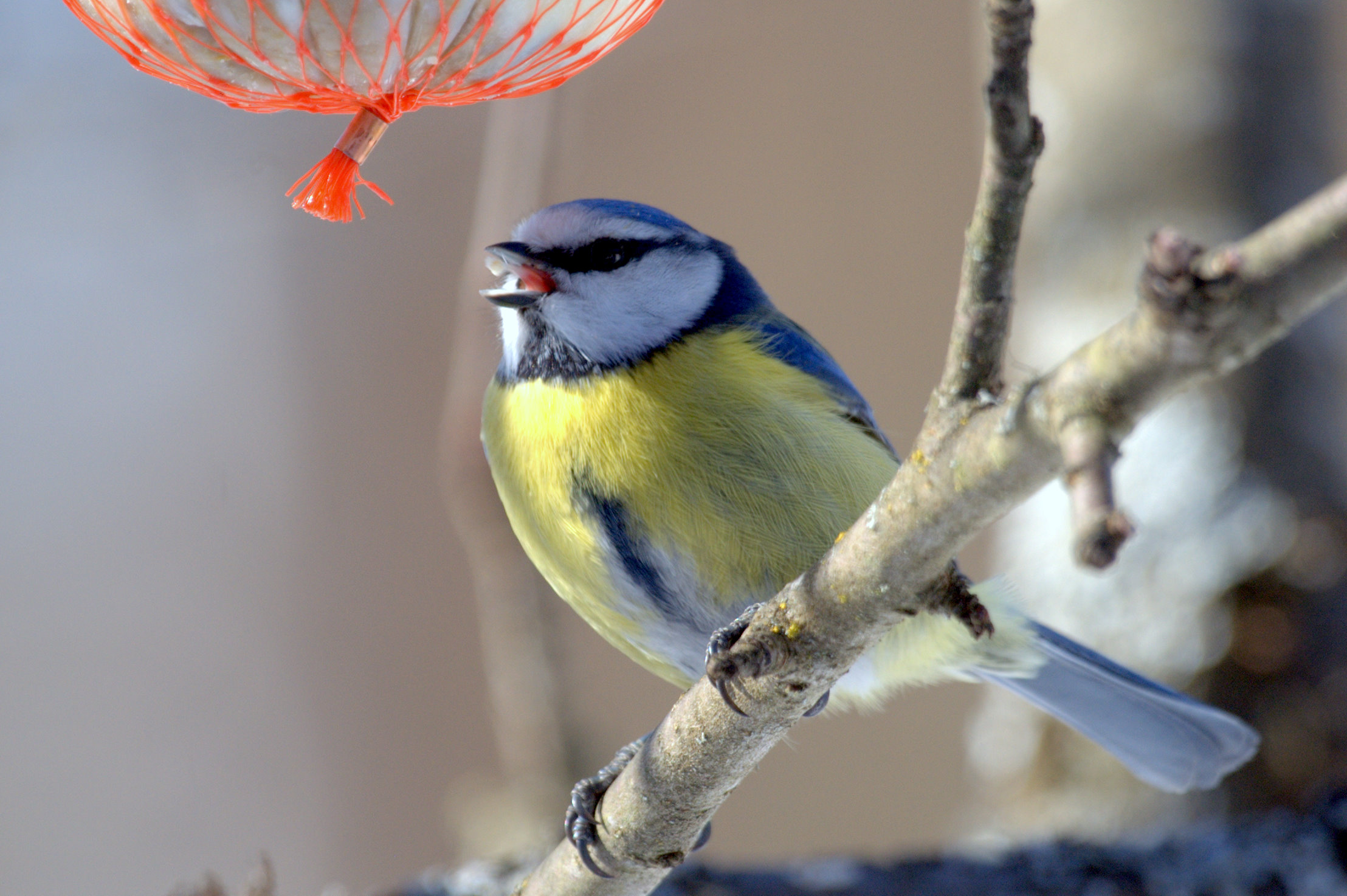 Sinitiainen talviruokinnalla